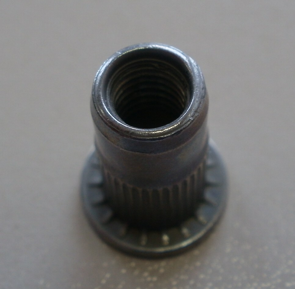 Nitonakrętka, widok od strony nagwintowanej.